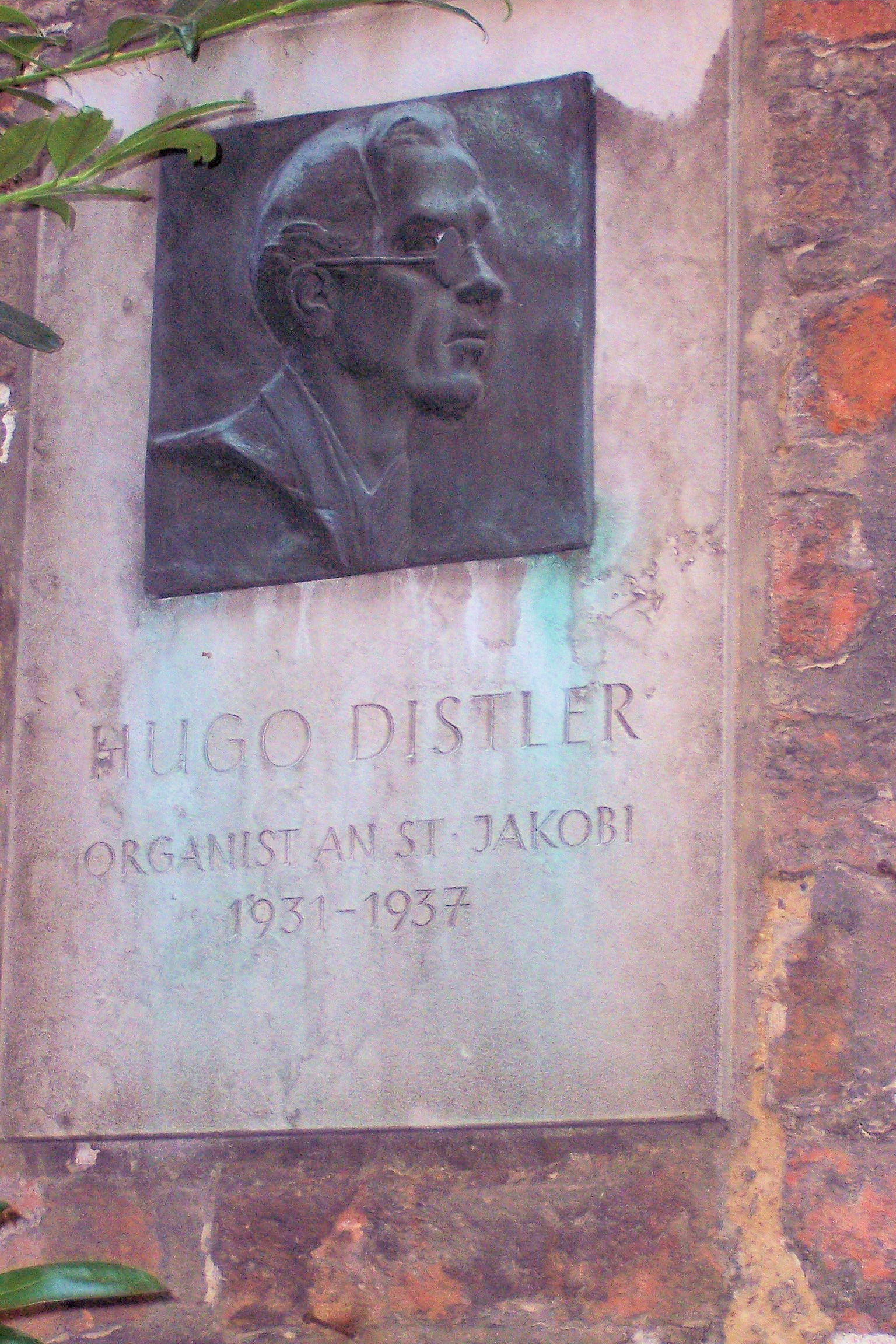 Gedenktafel für Hugo Distler an seiner zeitweiligen Wohnung neben der Jakobikirche (Lübeck)